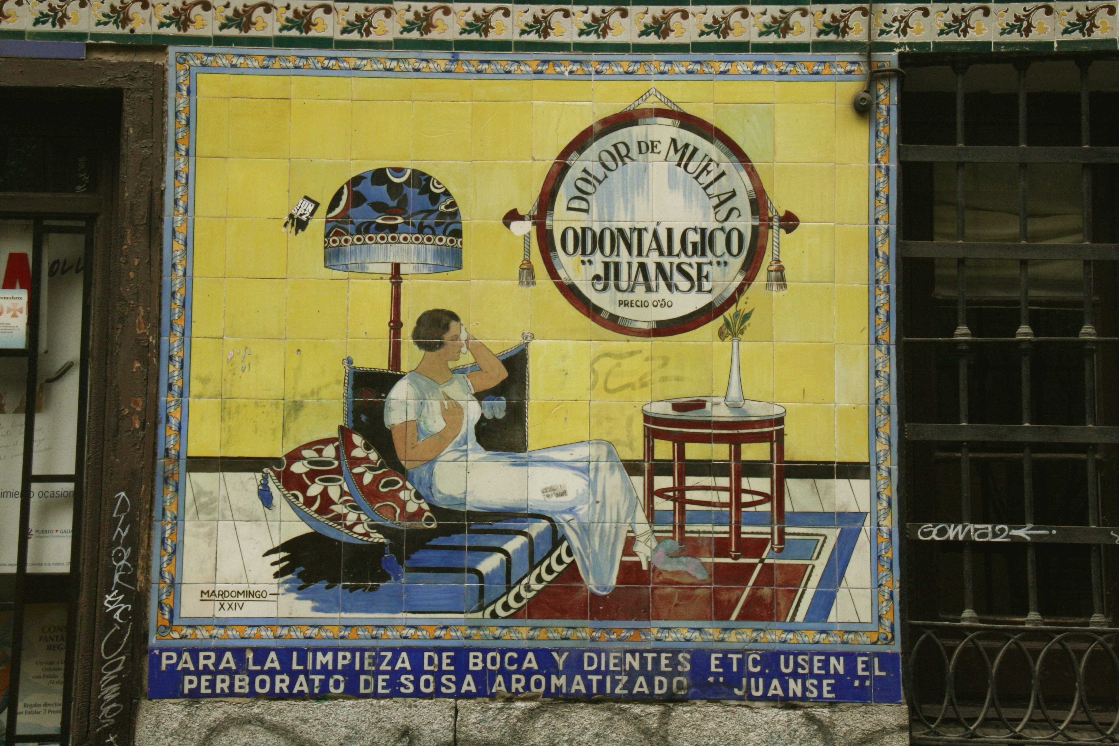 Farmacia Juanse (Madrid) - Perborato de sosa ("Juanse")